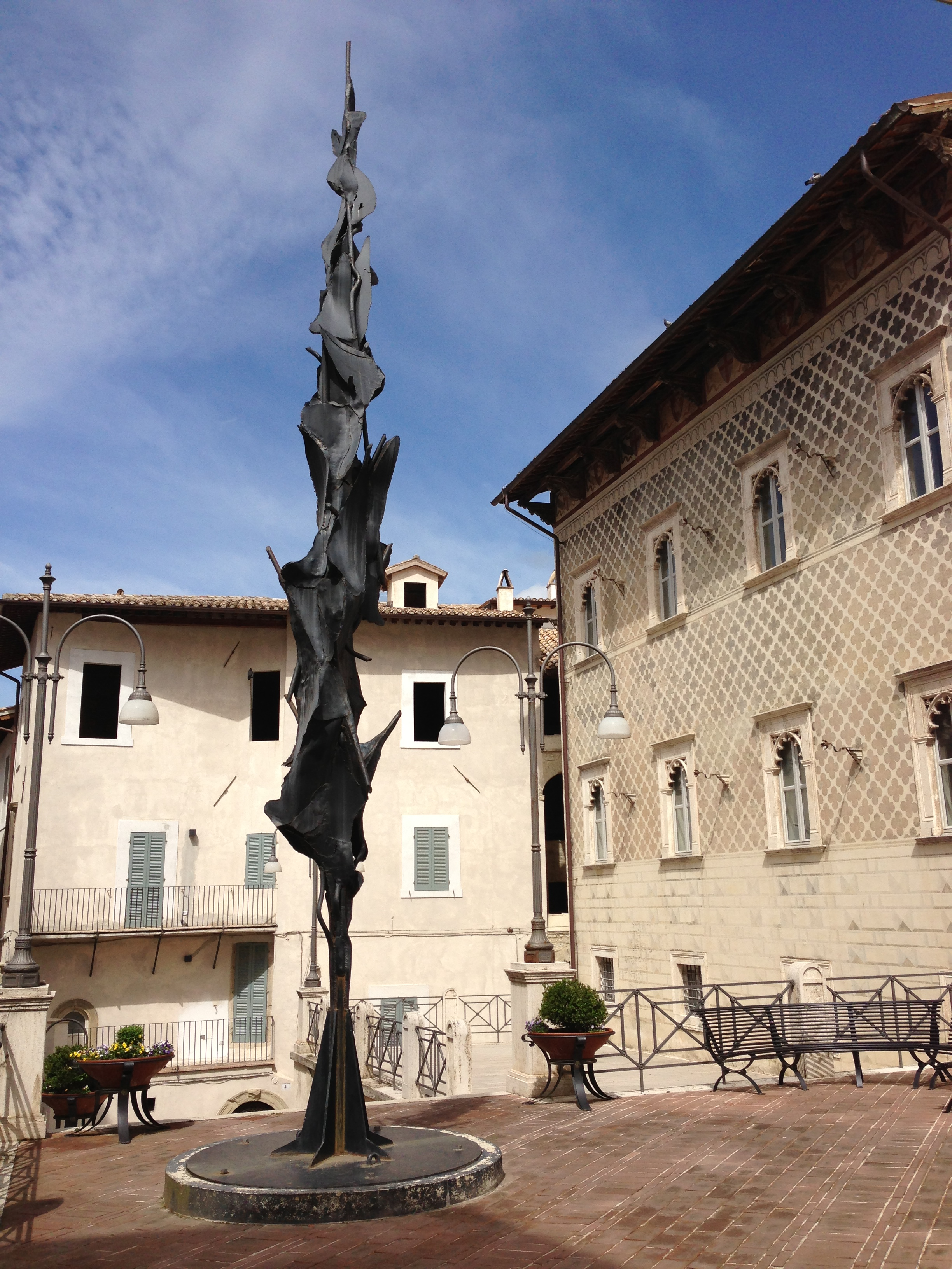 Scultura di Nino Franchina dal titolo Spoleto '62